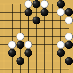 Quatre types de ko au jeu de go